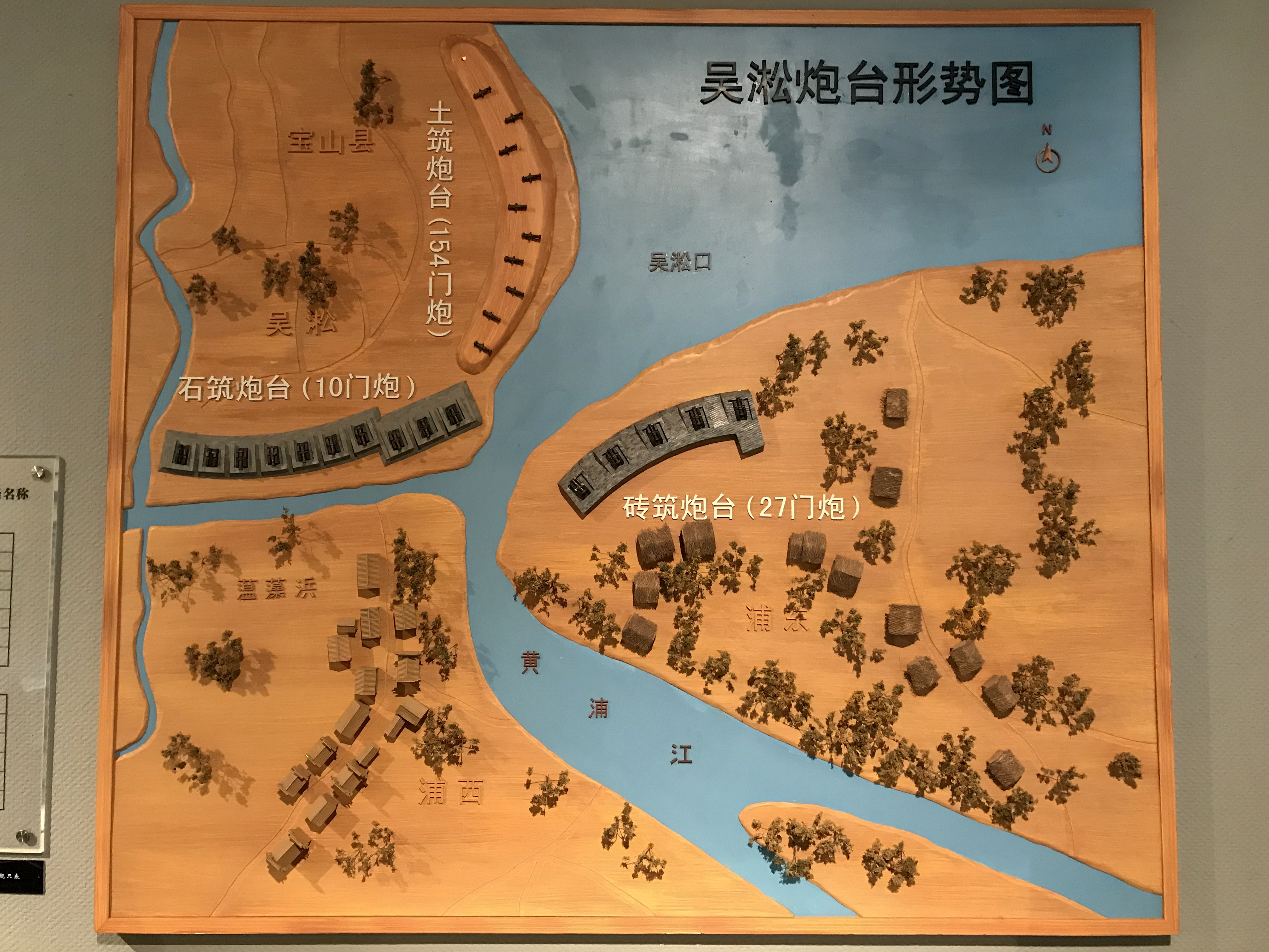 中文（中国大陆）: 吴淞炮台形势图